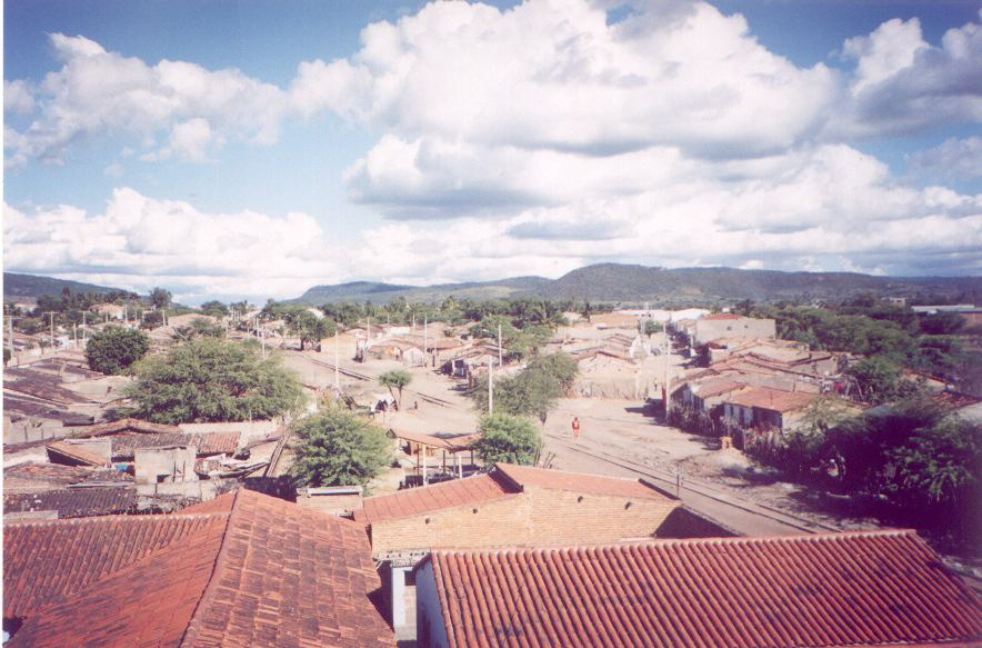 Die Müllstraße in Arcoverde, Pernambuco, Brasilien